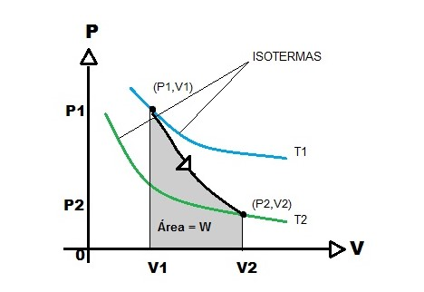 Diagrama de Pressão e Volume com Processo Cíclico